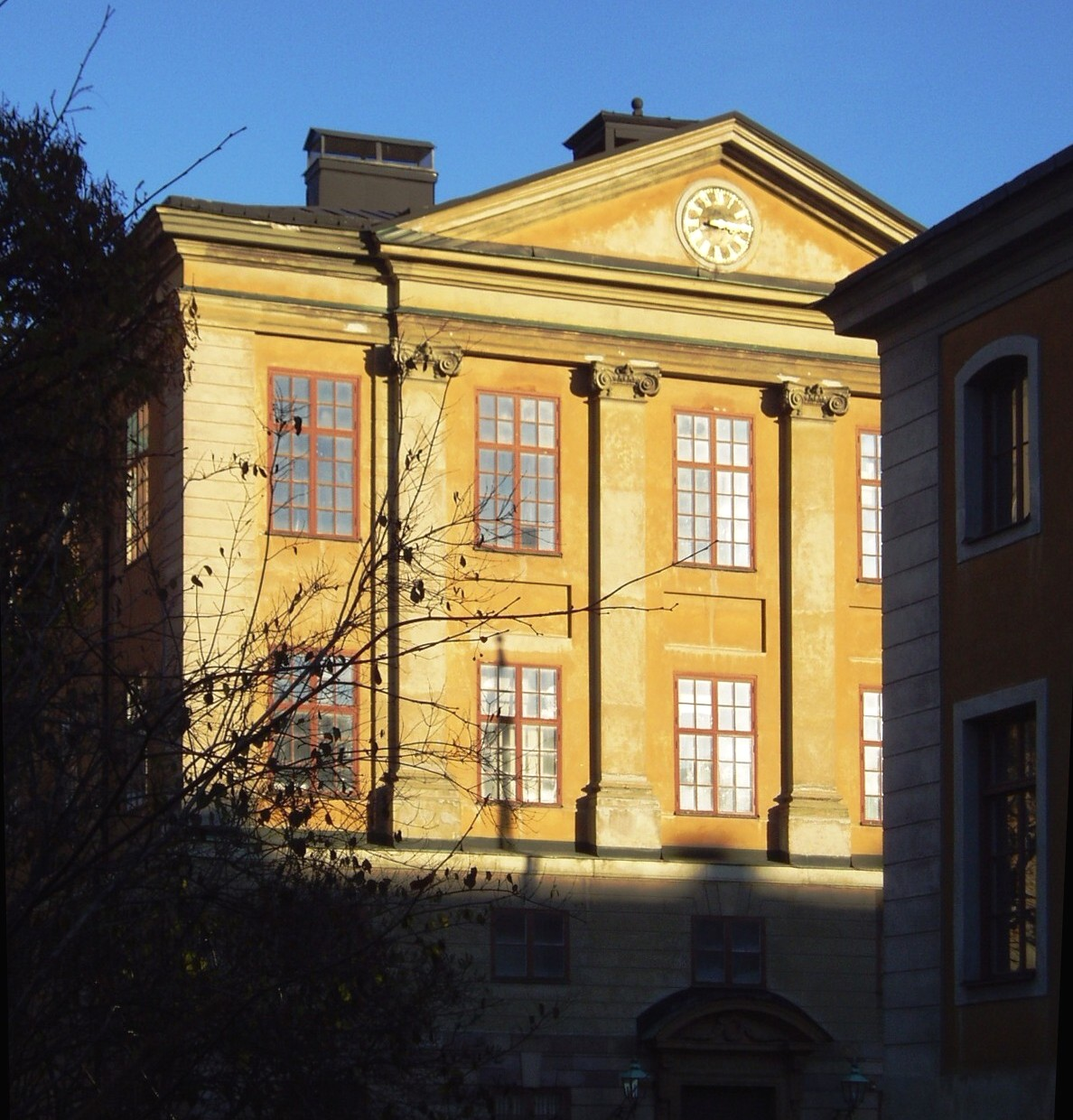 Fredrikshovs slott, Östermalm, Stockholm, (inte byggd som planerad)